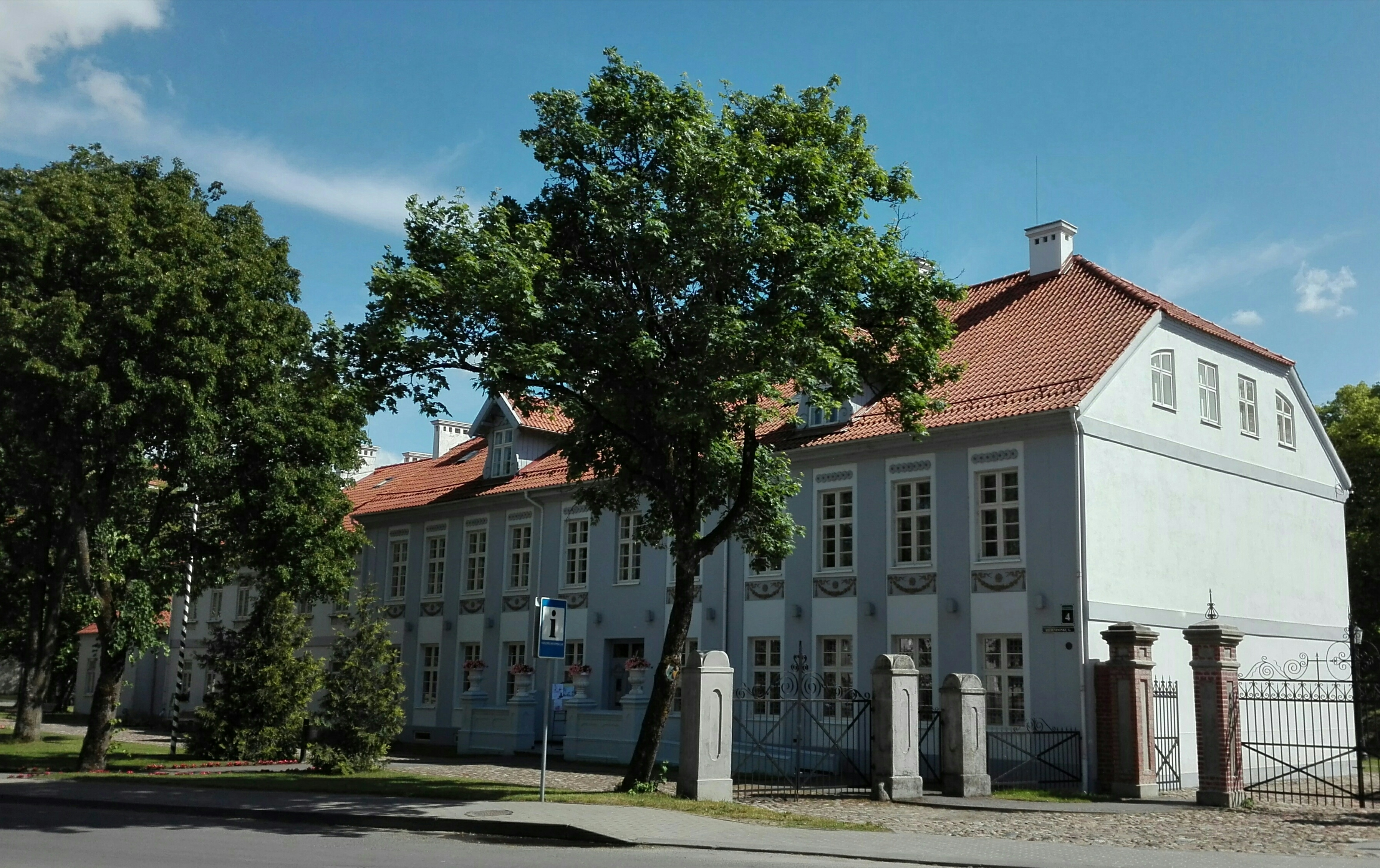 Hugo Šojaus dvaras